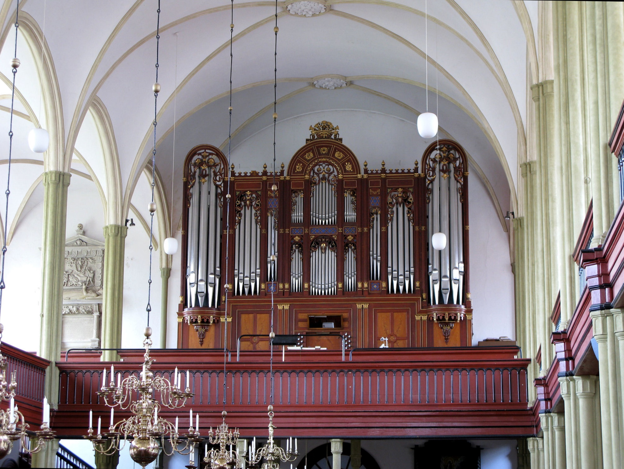 Orgel in Esens, Magnuskirche, Landkreis Wittmund